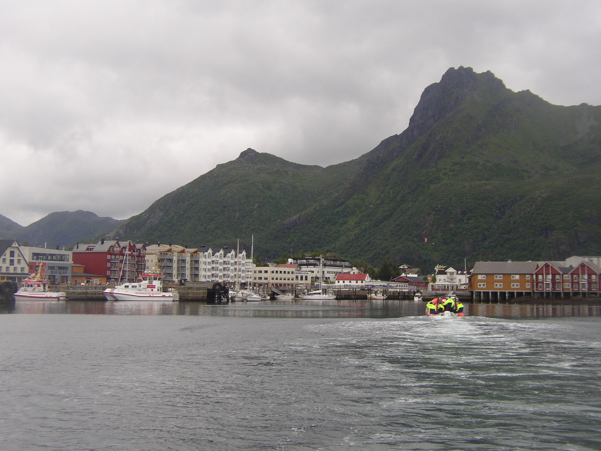 Entering the Svolvær harbour